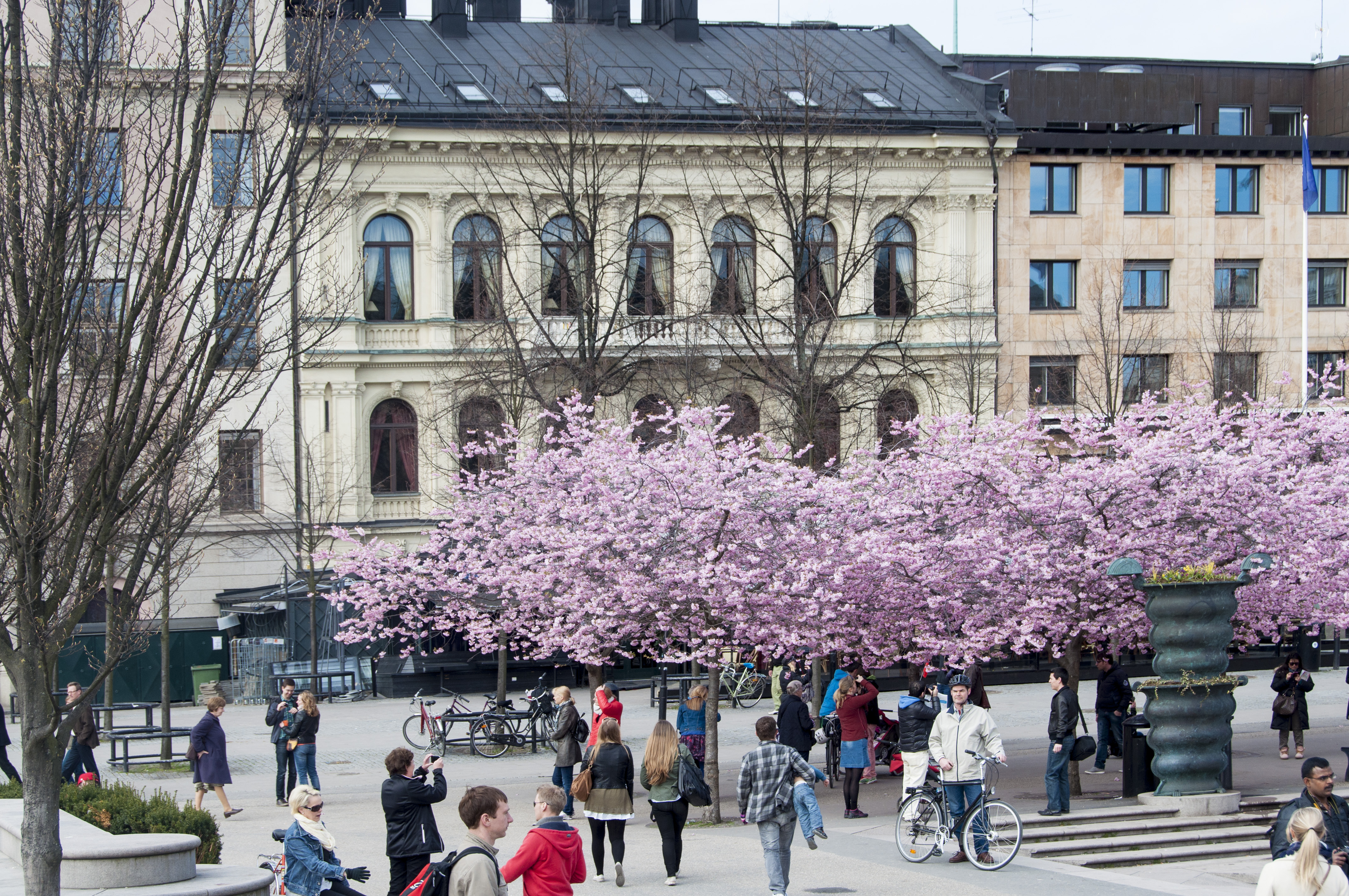 Körsbärsblom i Kungsträdgården